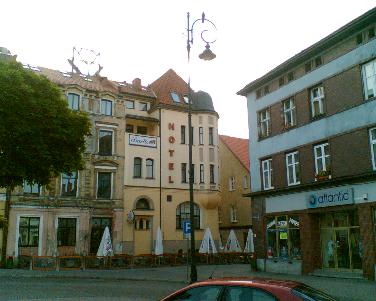 Hotel Bartis